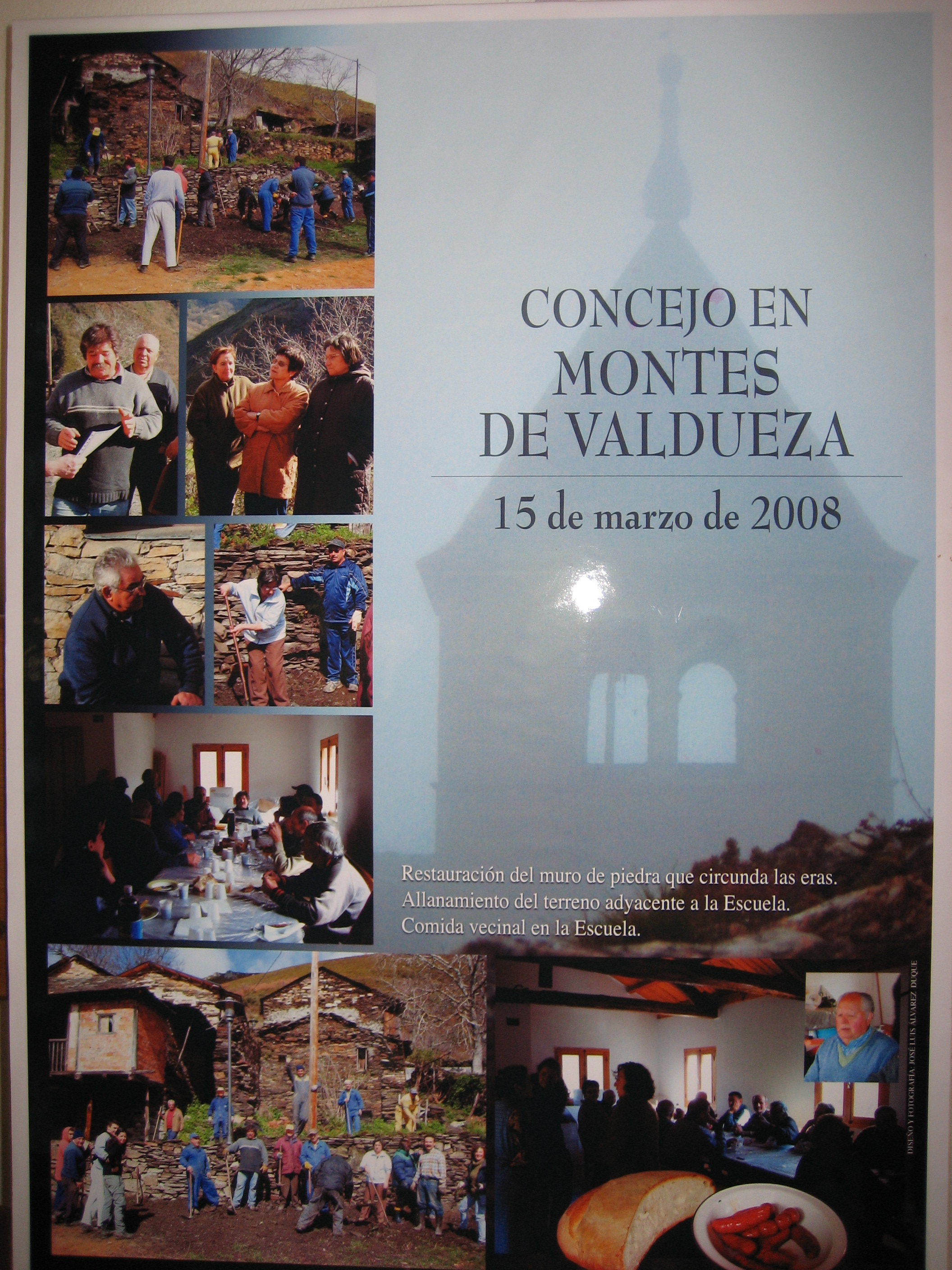 Concejo (organo tradicional en El Bierzo de gobierno en los pueblos que consiste en una reunión de los vecinos del pueblo, convocada por la Junta Vecinal y el Alcalde pedáneo, para tratar asuntos de importancia) en Montes de Valdueza.